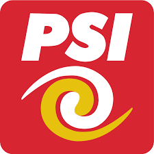 Logo del Partido Social de Integración